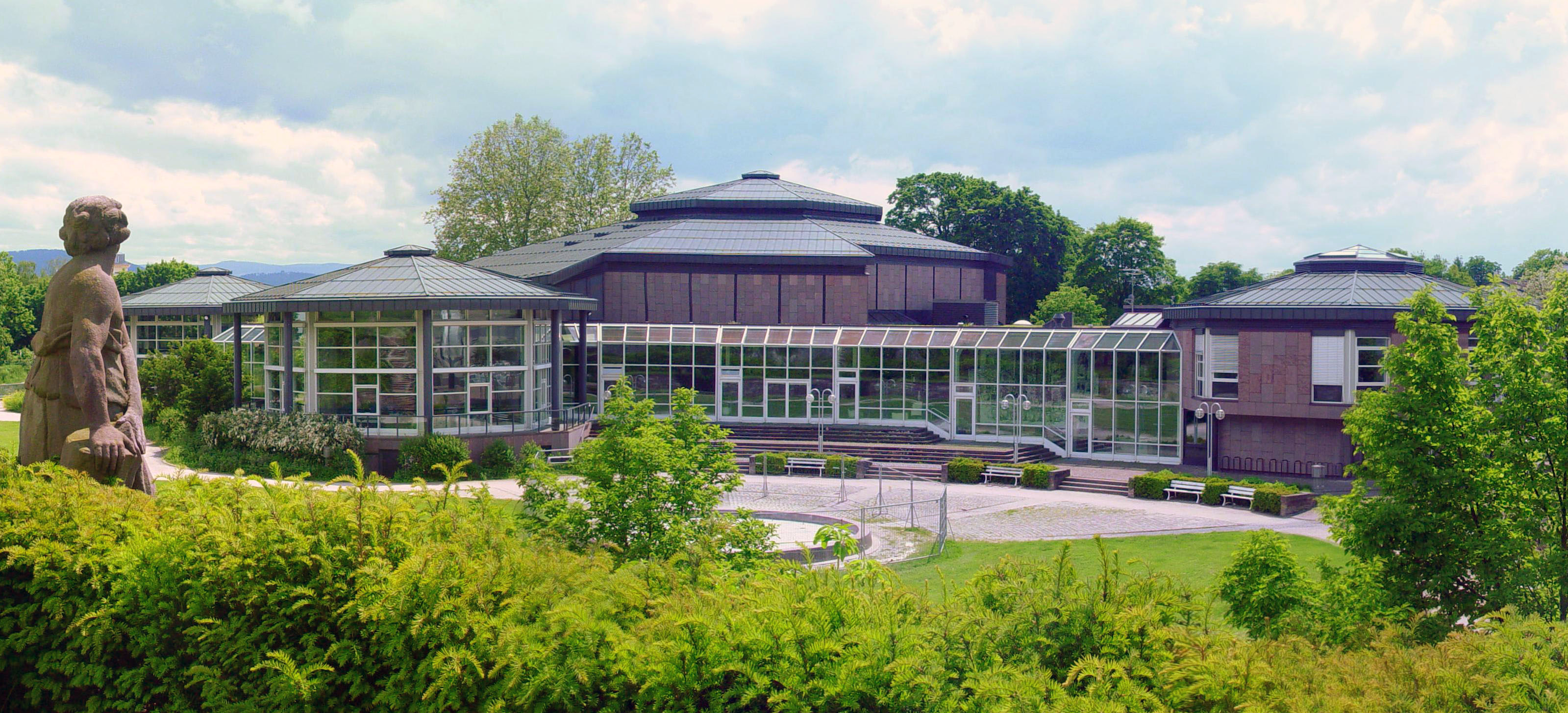 Fotografiert von Martin Dürrschnabel. Badnerhalle in Rastatt.